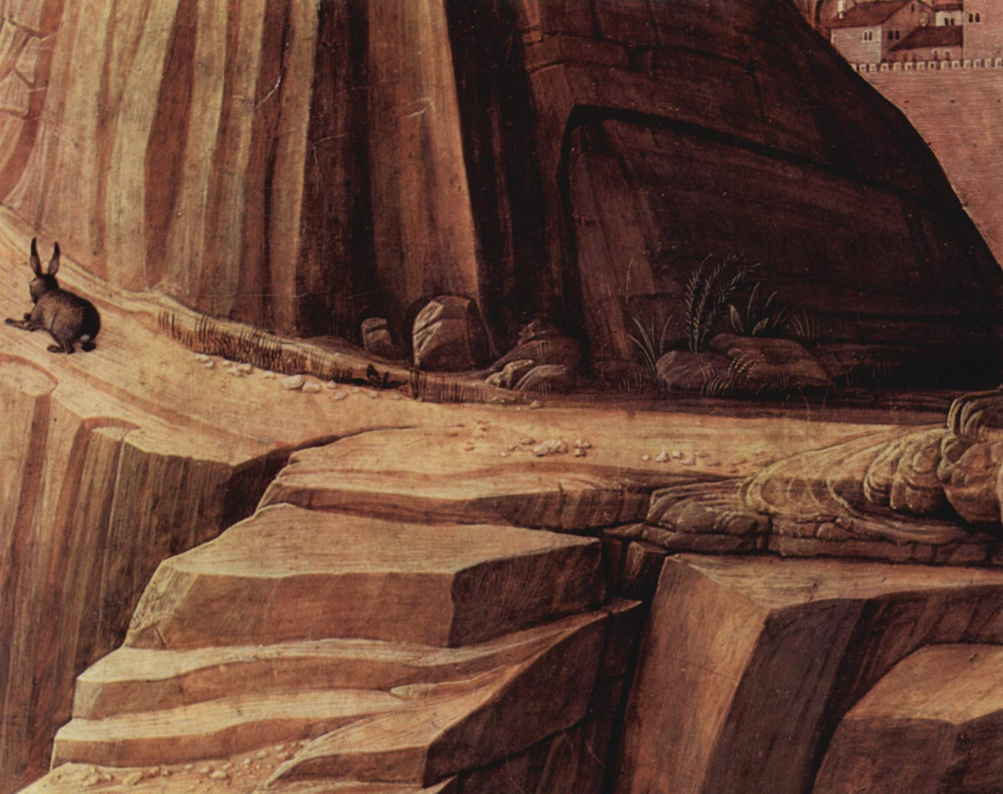 Felslandschaft mit bergauflaufendem Hasen